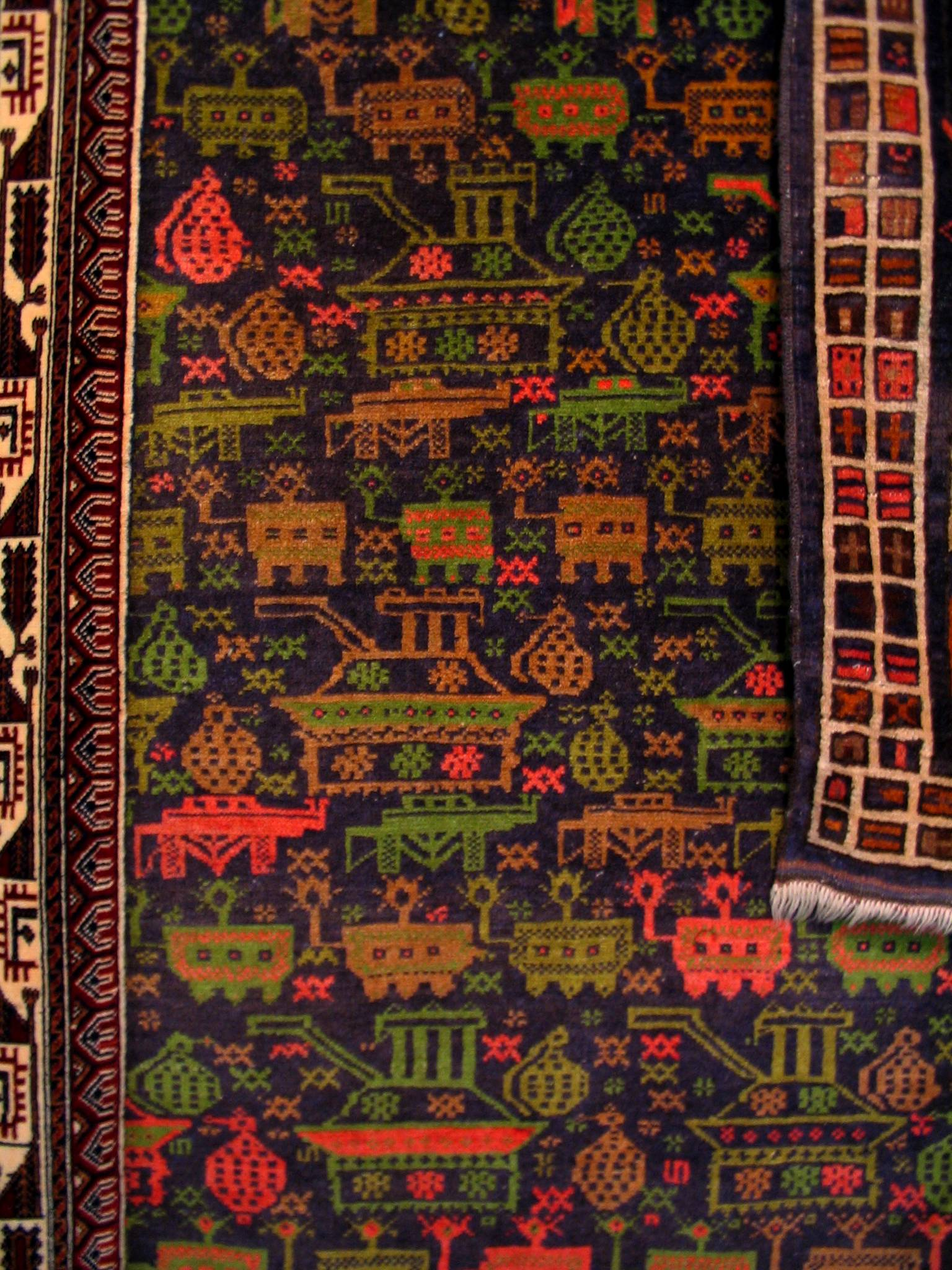 Tapis afghan à décor de chars, de grenades et de Kalachnikovs, "Le Grand Jeu", Michel Aubry, vue de l'installation (détail) au Musée de la tapisserie, Beauvais, exposition Décor & installations 2011/12. Collection Michel Aubry.